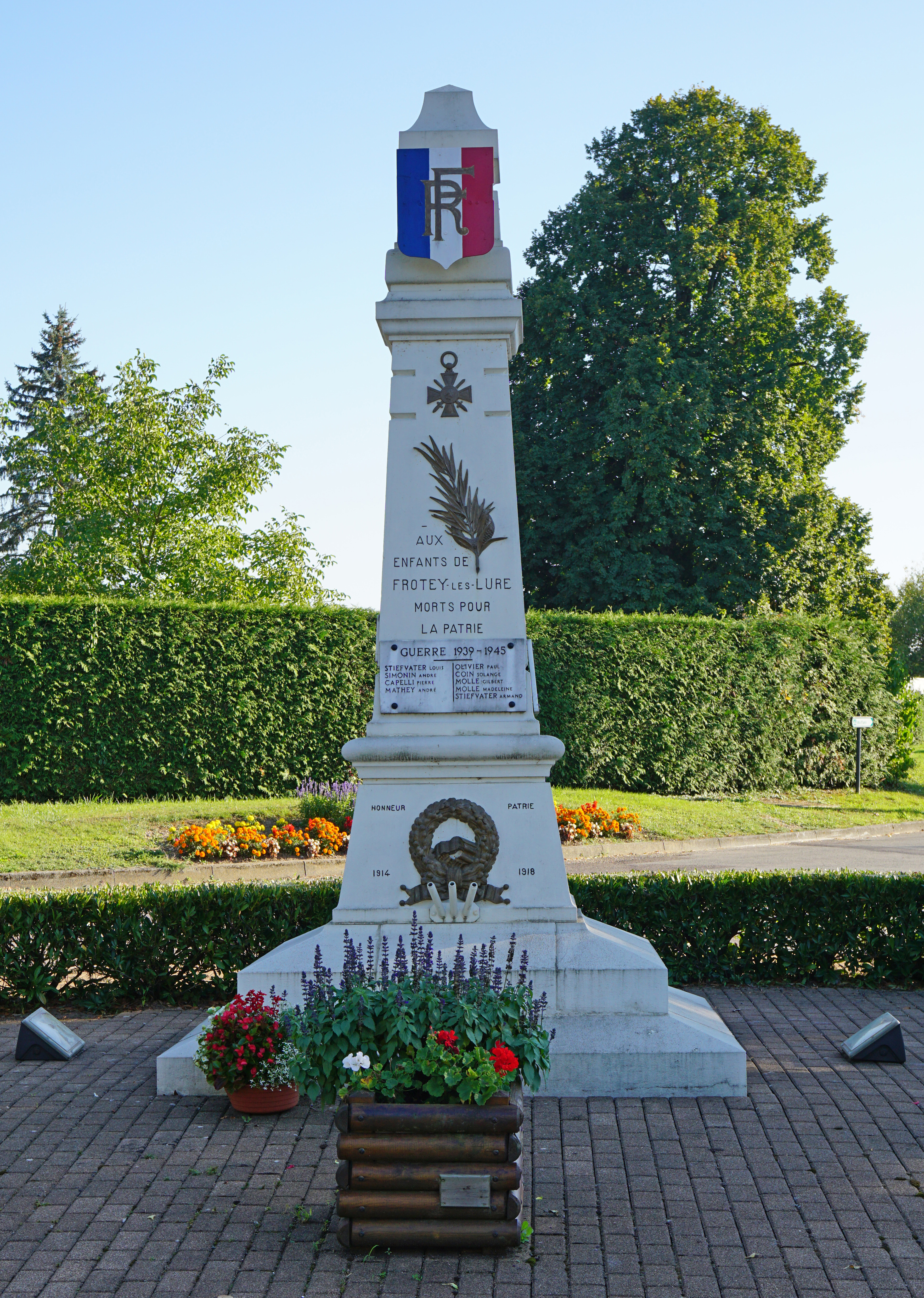 Le monument aux morts à Frotey-lès-Lure.